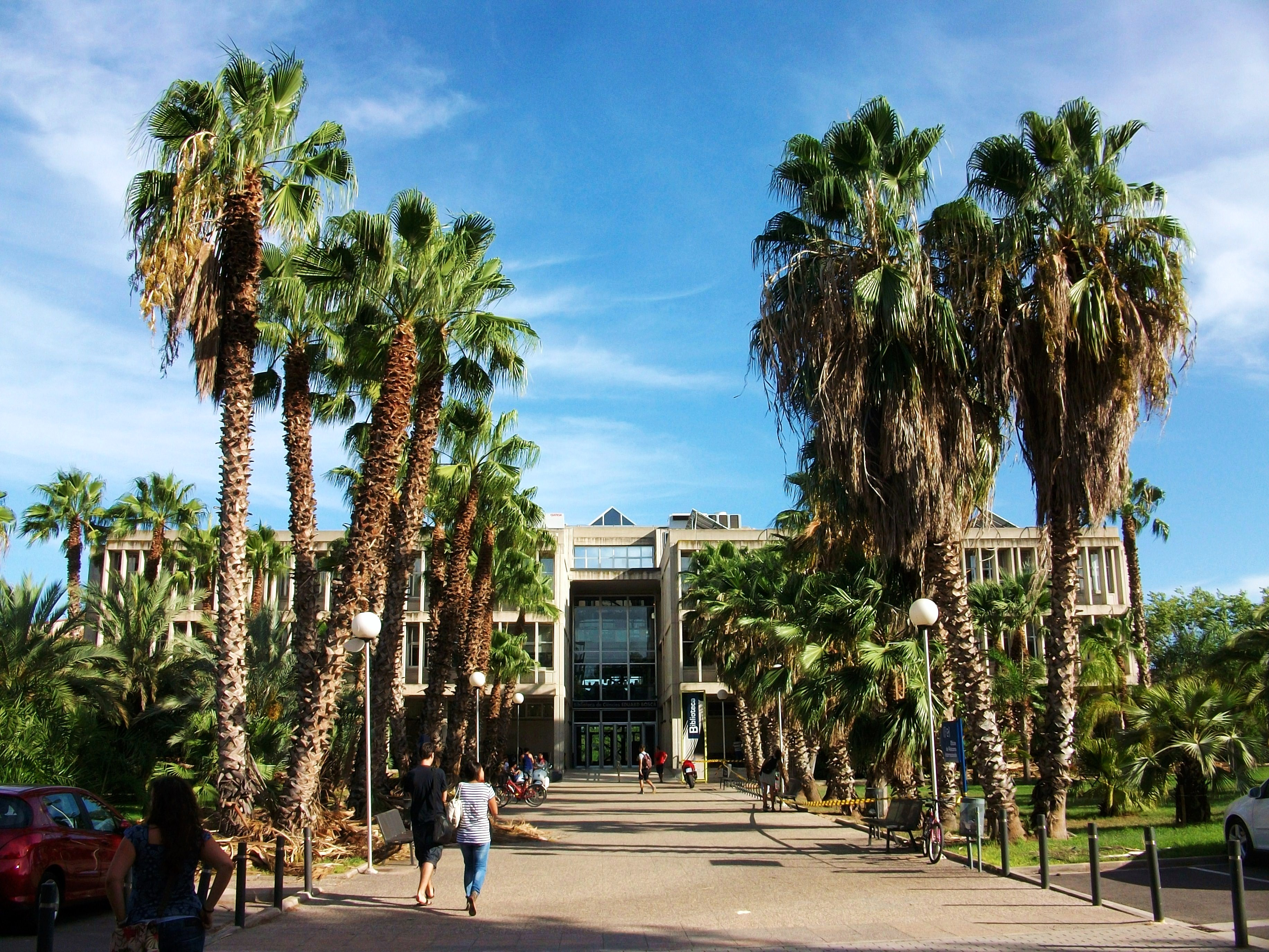 Biblioteca de Ciències Eduard Boscà, Campus de Burjassot de la Universitat de València.